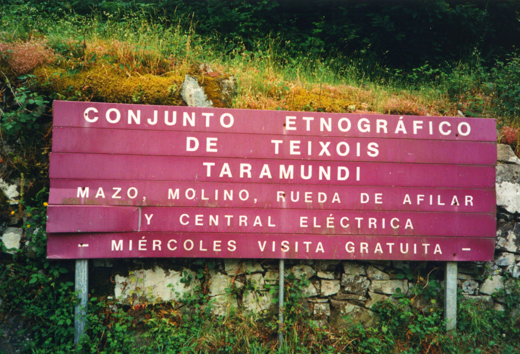 Taramundi (Asturias, España), conjunto etnográfico de Os Teixois;fotografía en papel. Taramundi (Asturias, Spain), Os Teixois ethnographic site. Paper photograph.